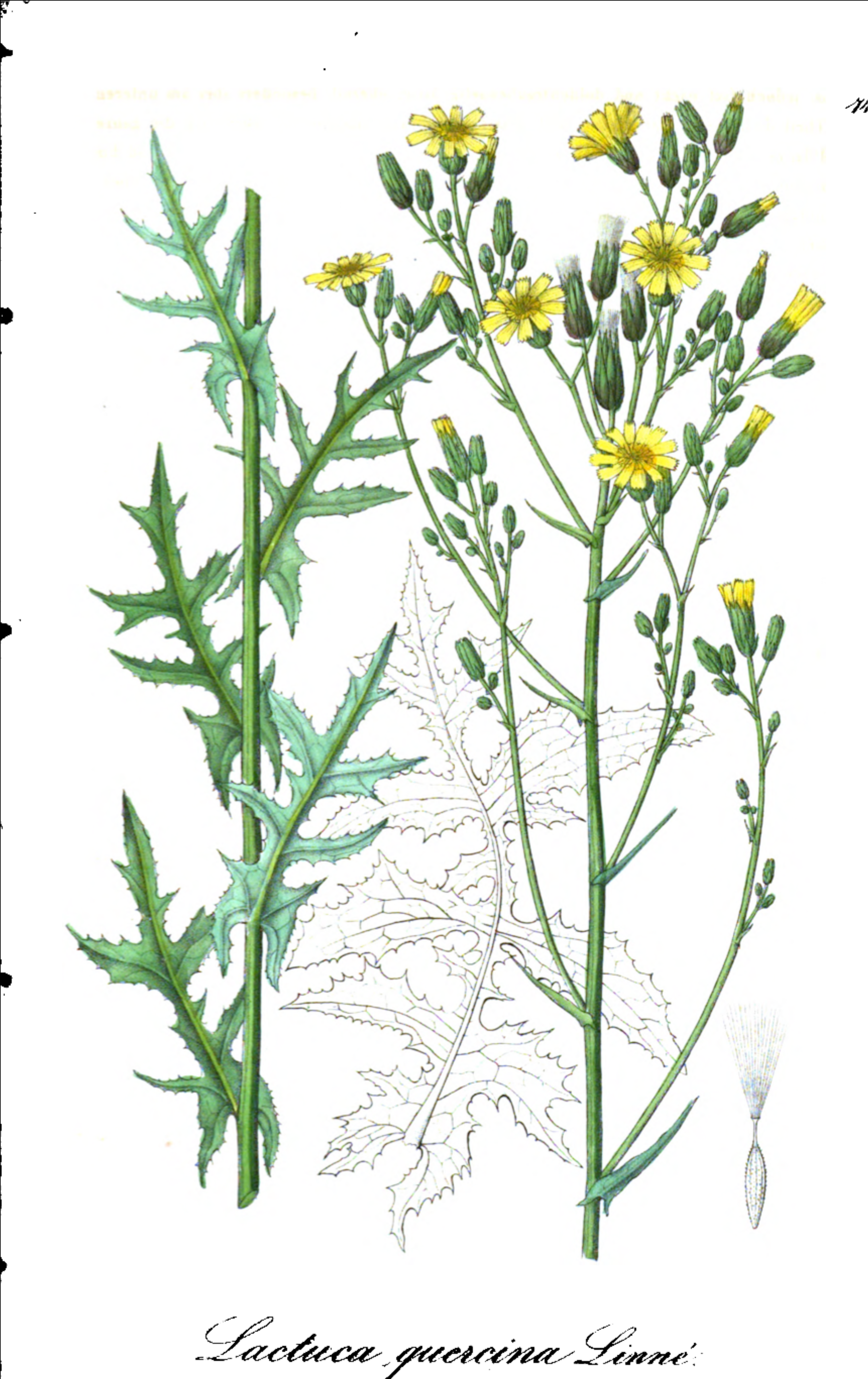 Dietrich, A. (1843) Flora des Königreichs Preussen. 11. Band. Ludwig Oehmigke. Tafel 741. Legende: Mittlerer Teil der Pflanze. Unteres Stängelblatt. Oberer Teil der Pflanze. Frucht.